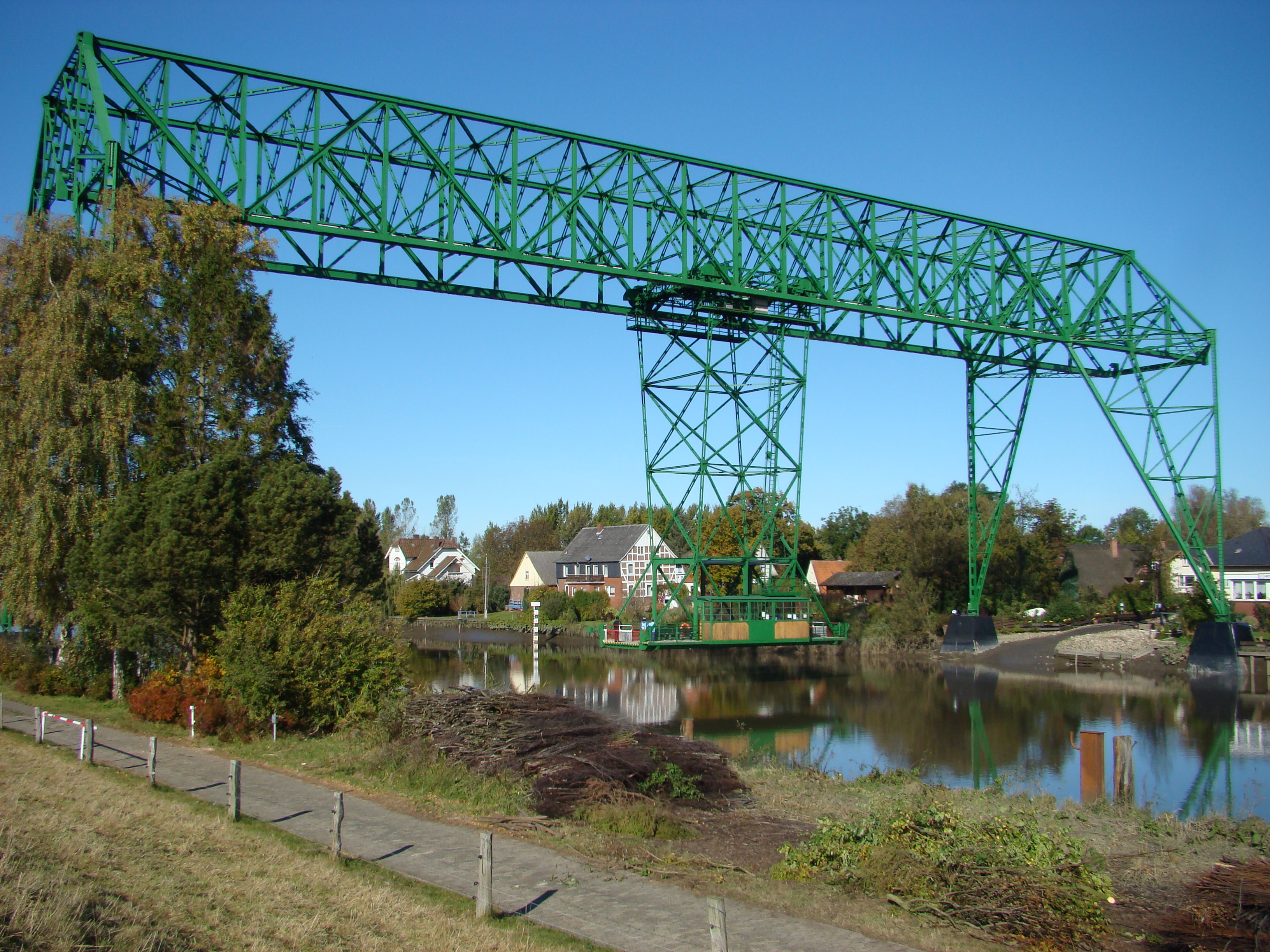 Schwebefähre Osten-Hemmor in Betrieb